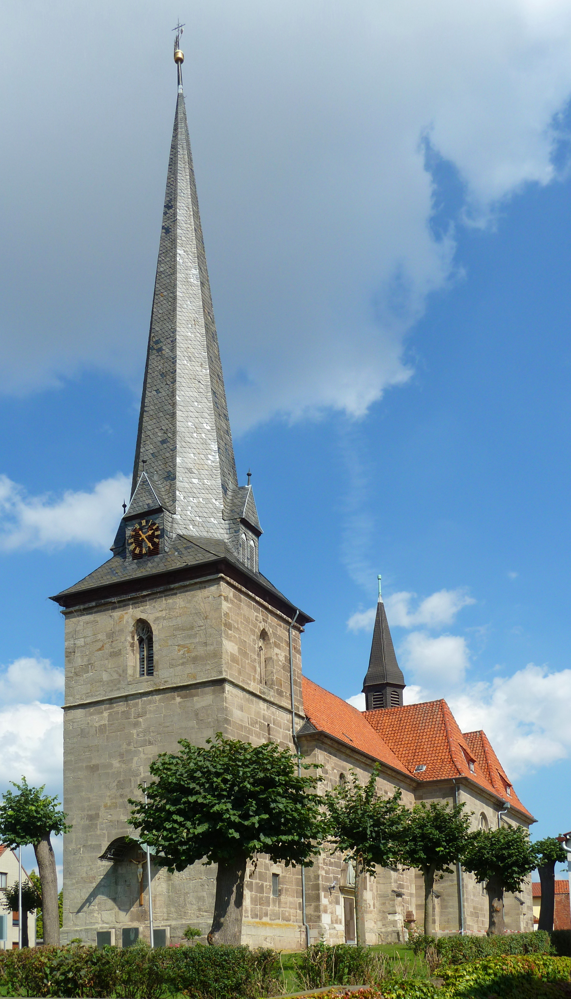 Katholische Pfarrkirche St. Blasius in Obernfeld, Niedersachsen. Westturm (datiert 1448) und Teile des Langhauses spätgotisch, Brand und WIederaufbau 1626/29, Umbauten 1721 und 1750, Osterweiterung 1912/14